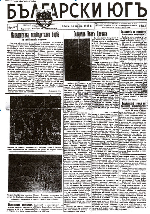 Вестник „Български юг“.